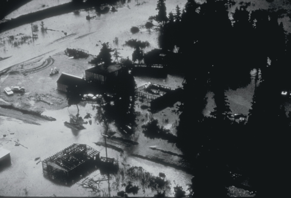 Subsidence at Portage, Alaska